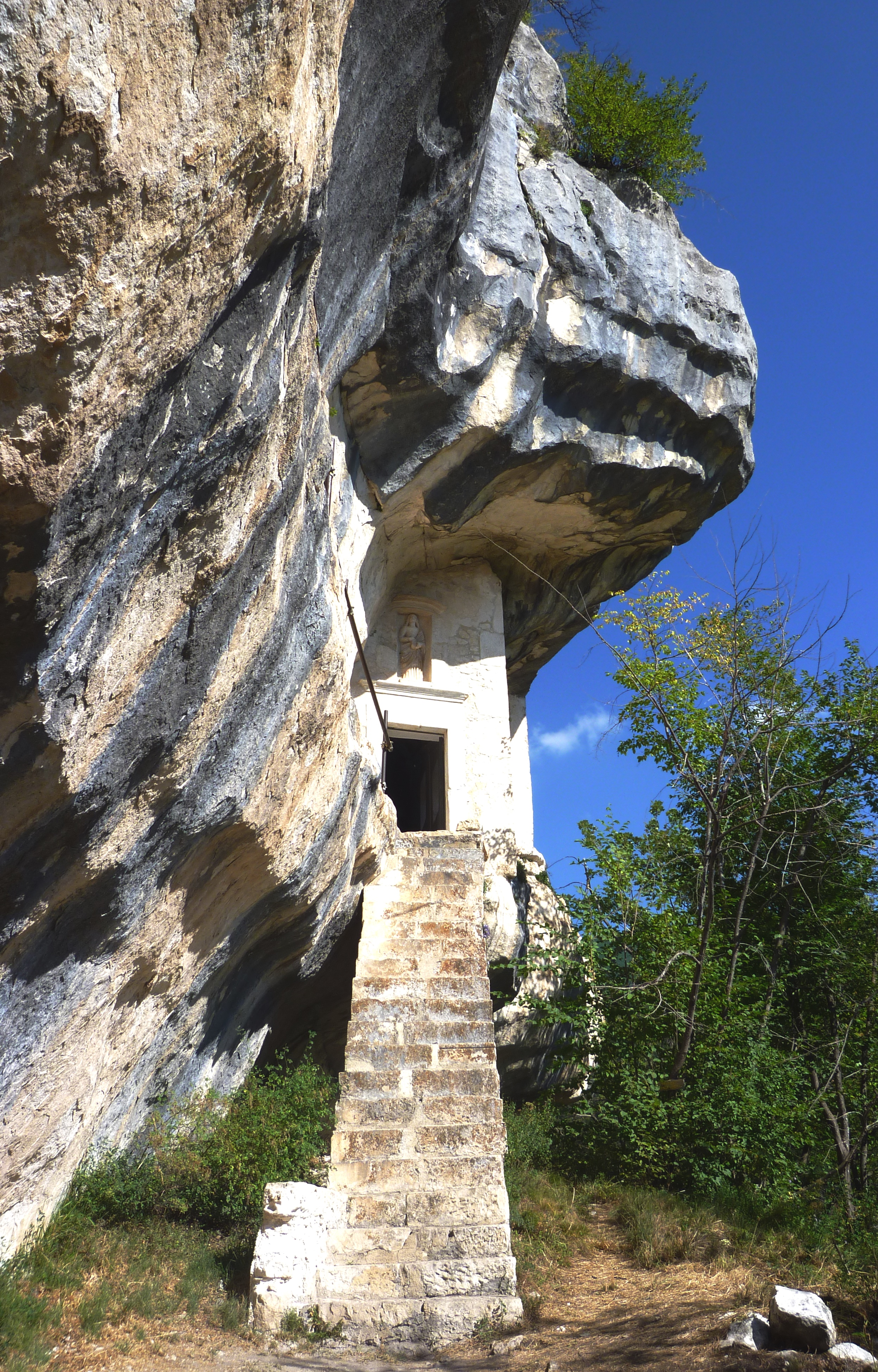 Eremo di Santo Spirito a Majella. Roccamorice, Pescara.